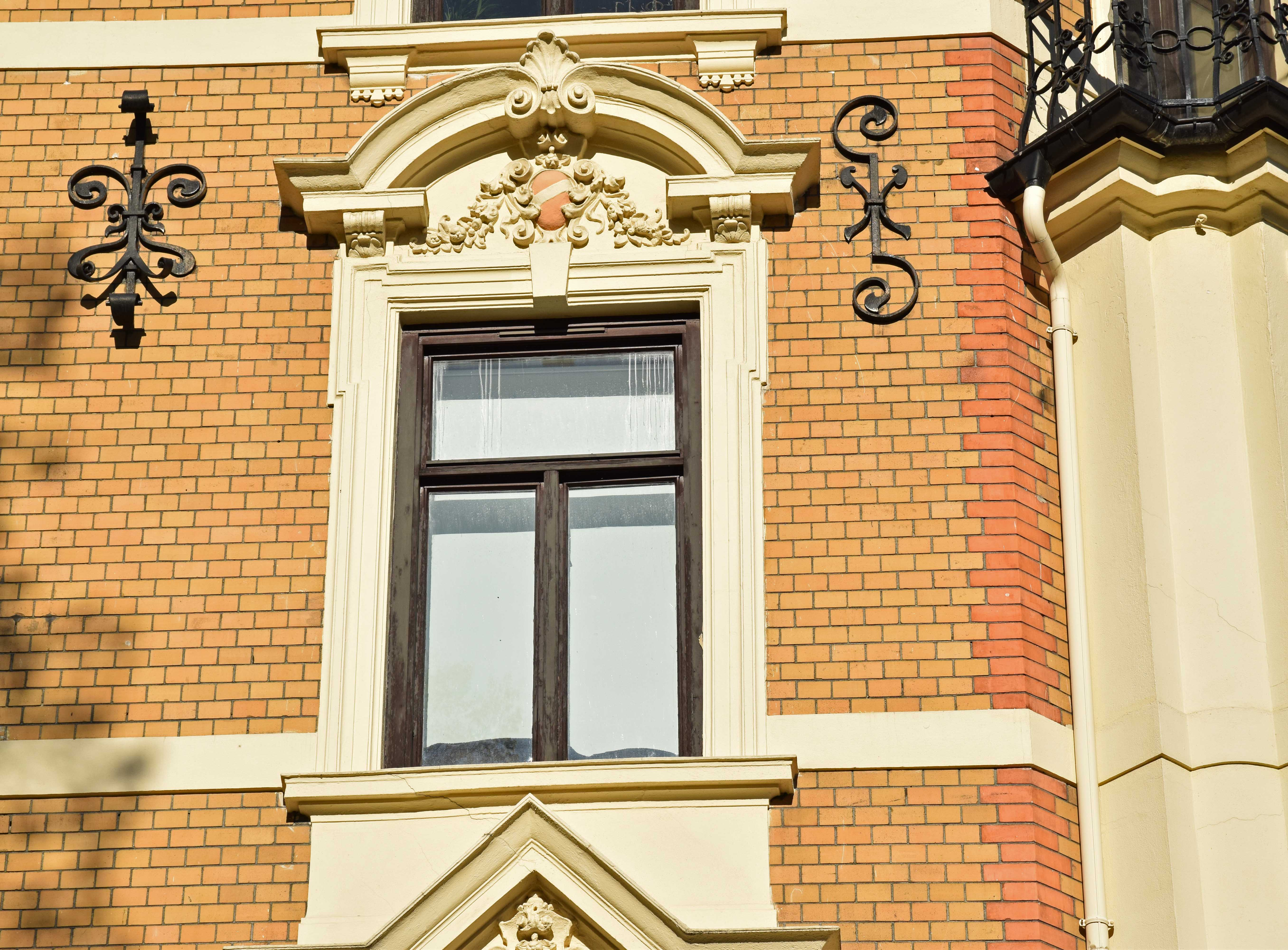 Vindu og jernankre Markveien 67B, 3. etasje, Grünerløkka